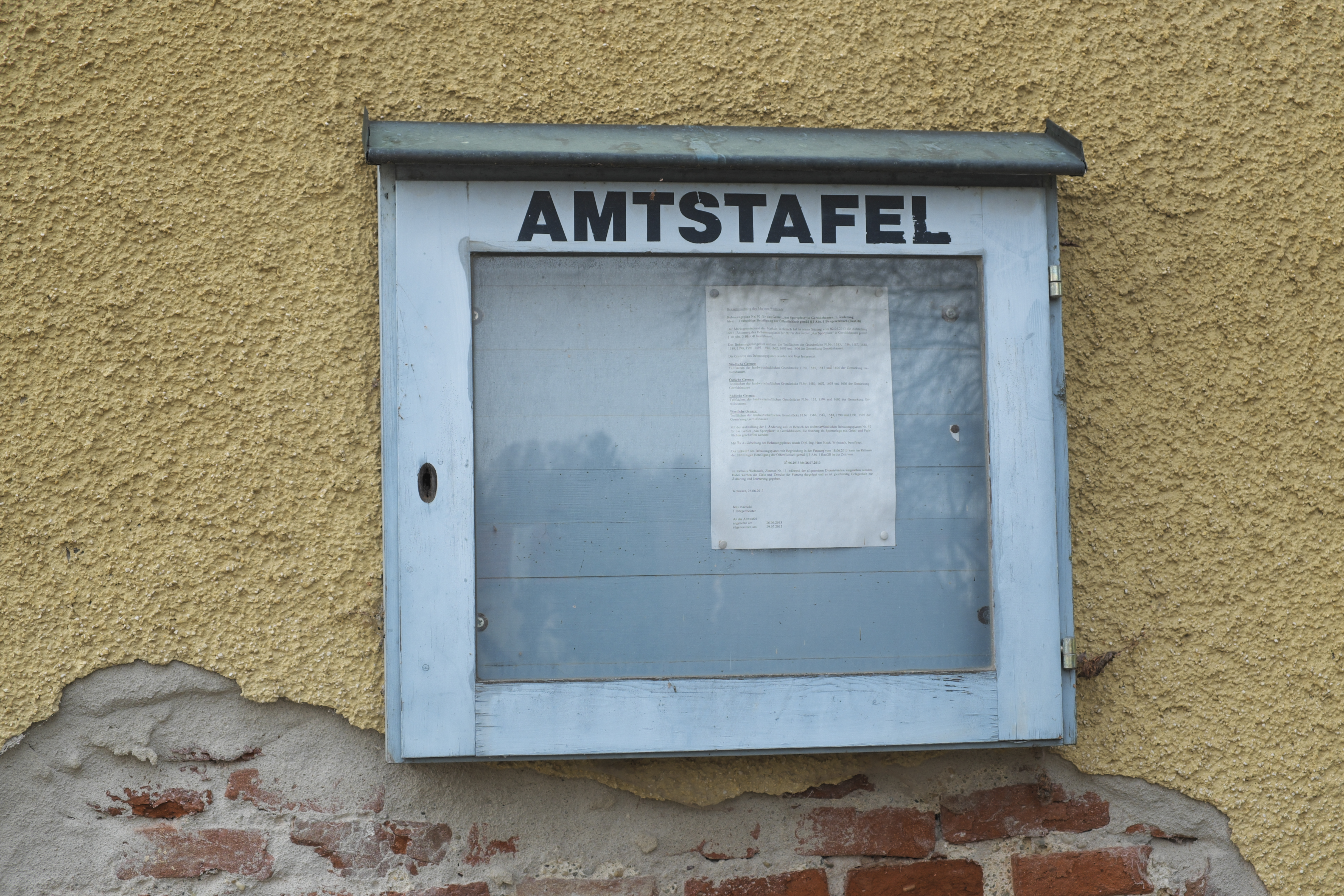 Amtstafel in Geroldshausen (Wolnzach) im Landkreis Pfaffenhofen an der Ilm (Bayern/Deutschland)